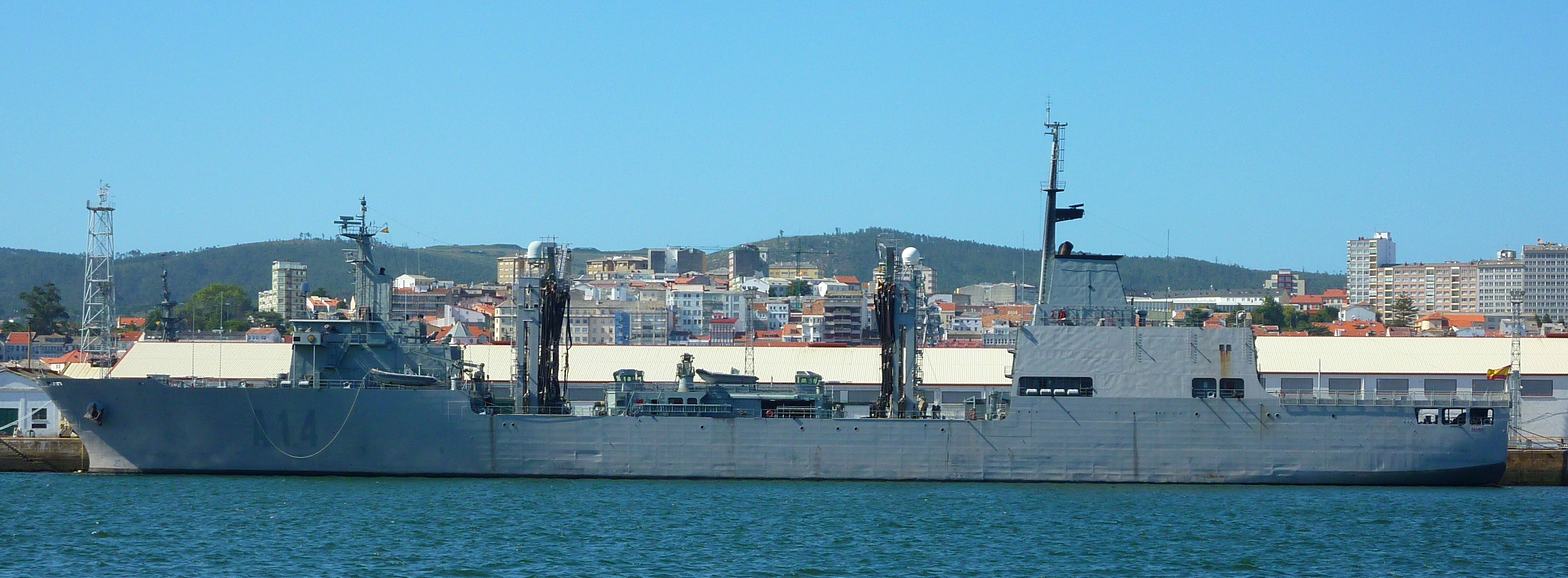 Buque de aprovisionamiento "Patiño", A-14, de la Armada Española.